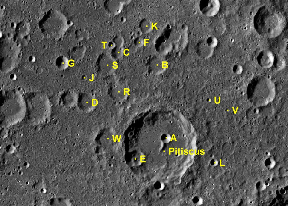 Cráter lunar Pitiscus. Cráteres satélite. (Imagen LRO)